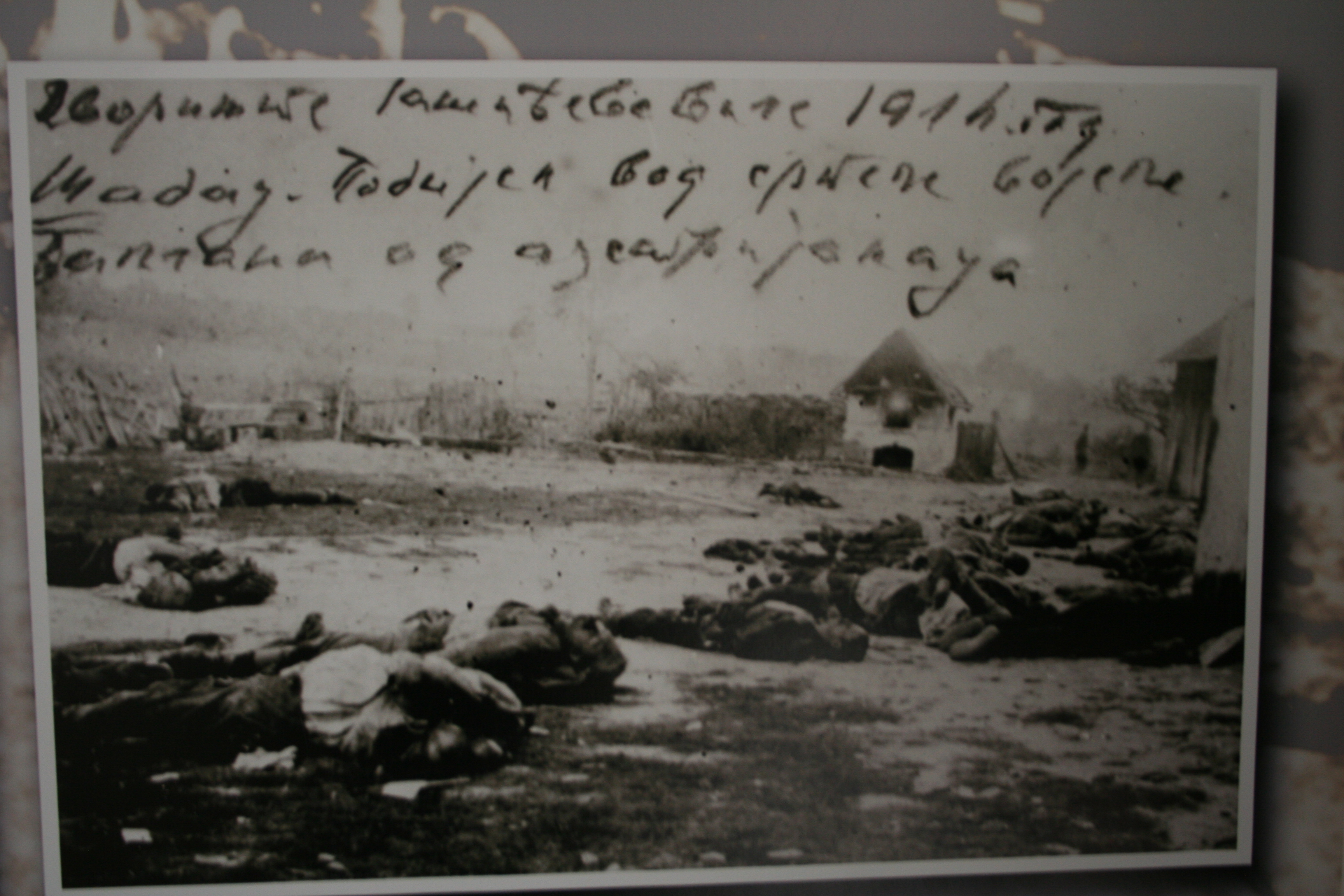 Memorijalna galerija Bitke na Drini 1914. Banja Koviljača